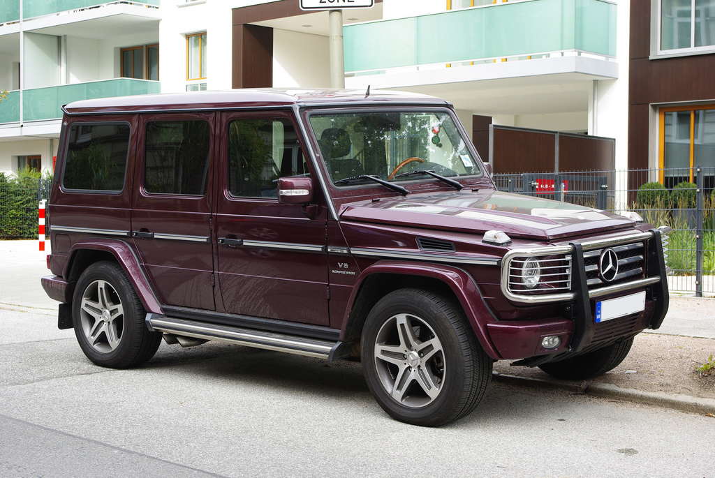 Mercedes-Benz G55 AMG